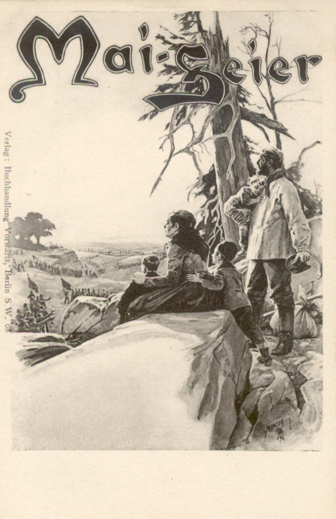 Postkarte zur Maifeier aus dem Jahre 1895